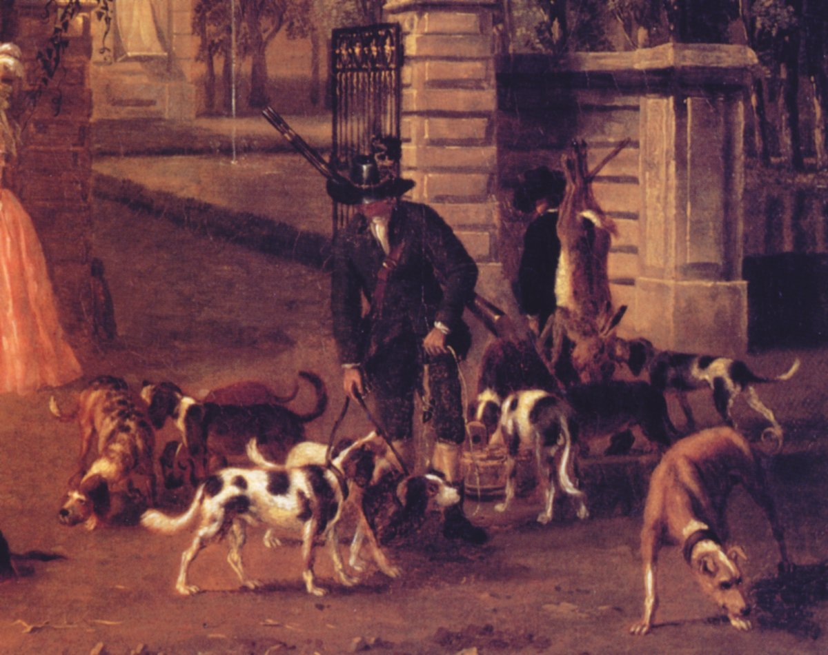 Bernische Campagne mit Jagdgesellschaft (Ausschnitt).